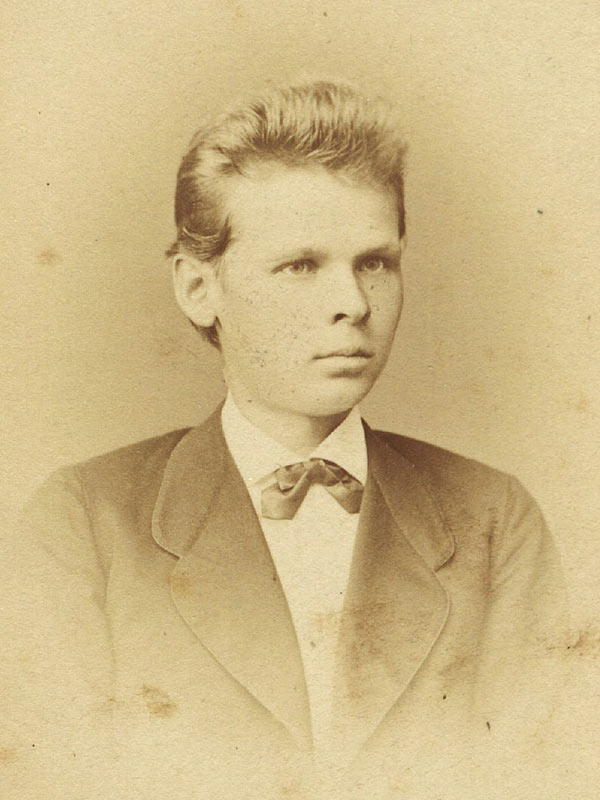 И.Я. Кривощеков (портрет). г. Пермь. 1874 г.